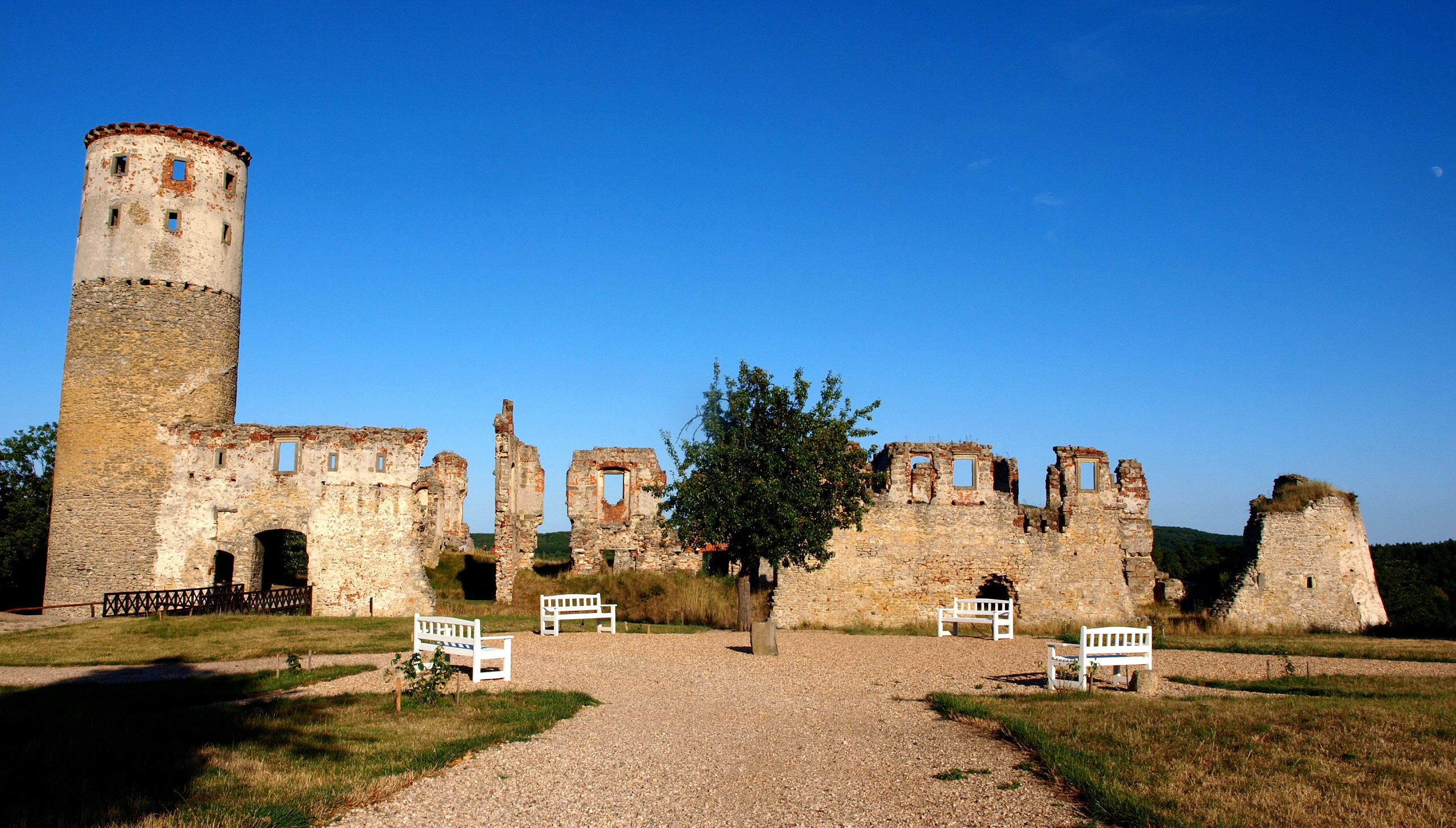 Zřícenina hradu Zvířetice